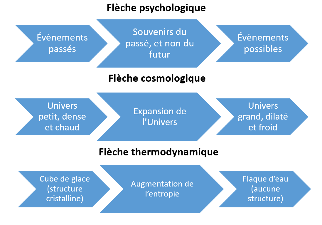 Schémas présentant des exemples de différentes flèches du temps.